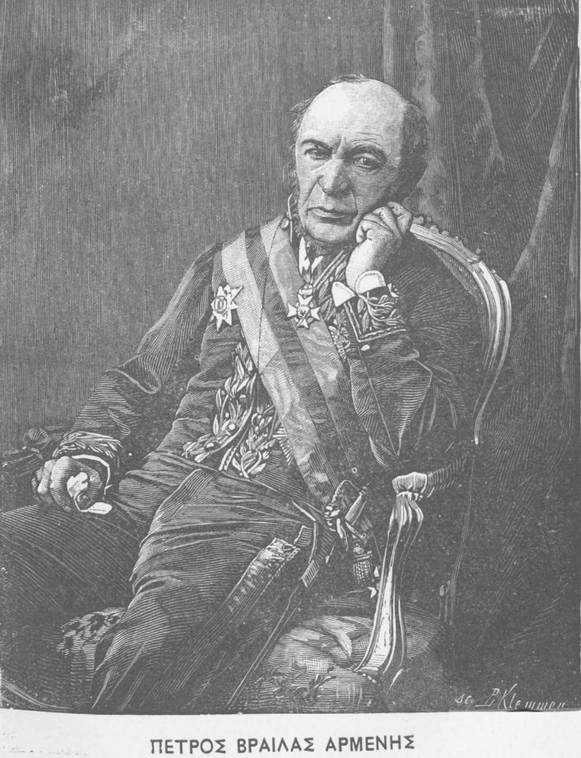 Griechischer Politiker, 19. Jahrhundert